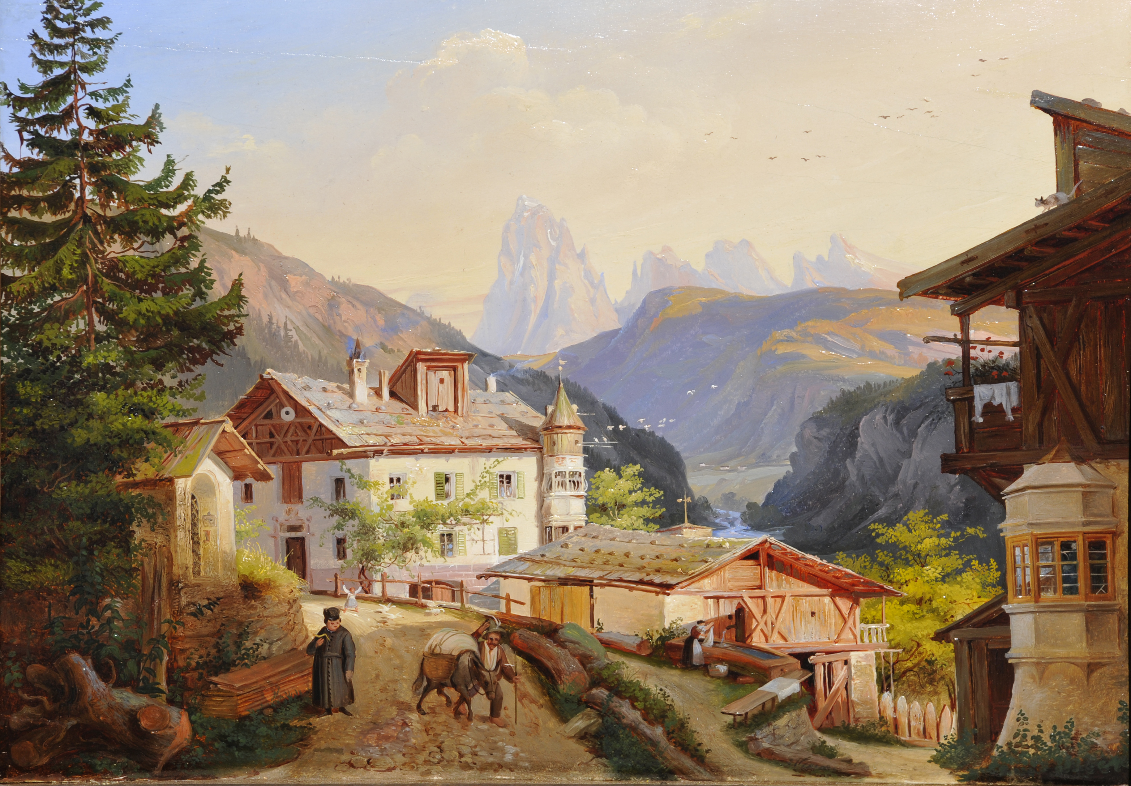 s. Ausstellungskatalog der Tiroler Kunstausstellung 1879 (in der Bibliothek des Landesmuseum Ferdinandeum)